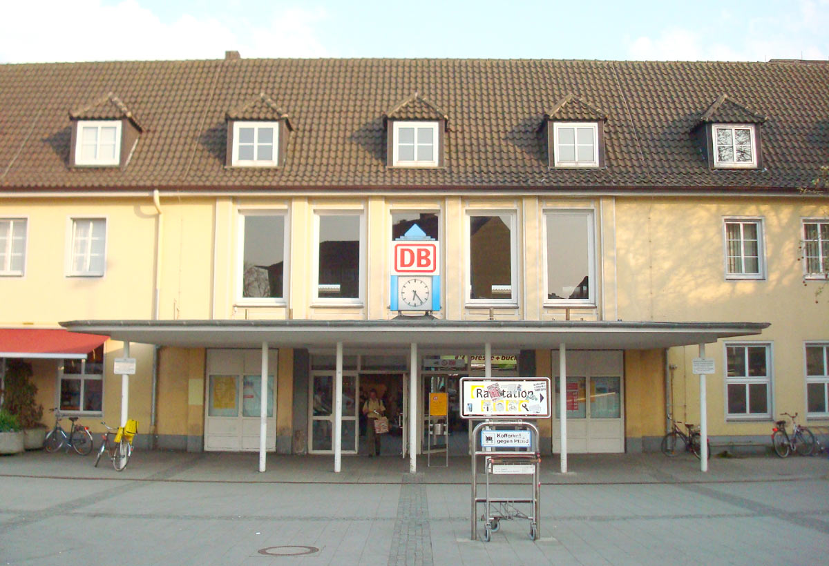 Eingang des Hauptbahnhofs Gütersloh, vom Omnisbusbahnhof aus gesehen